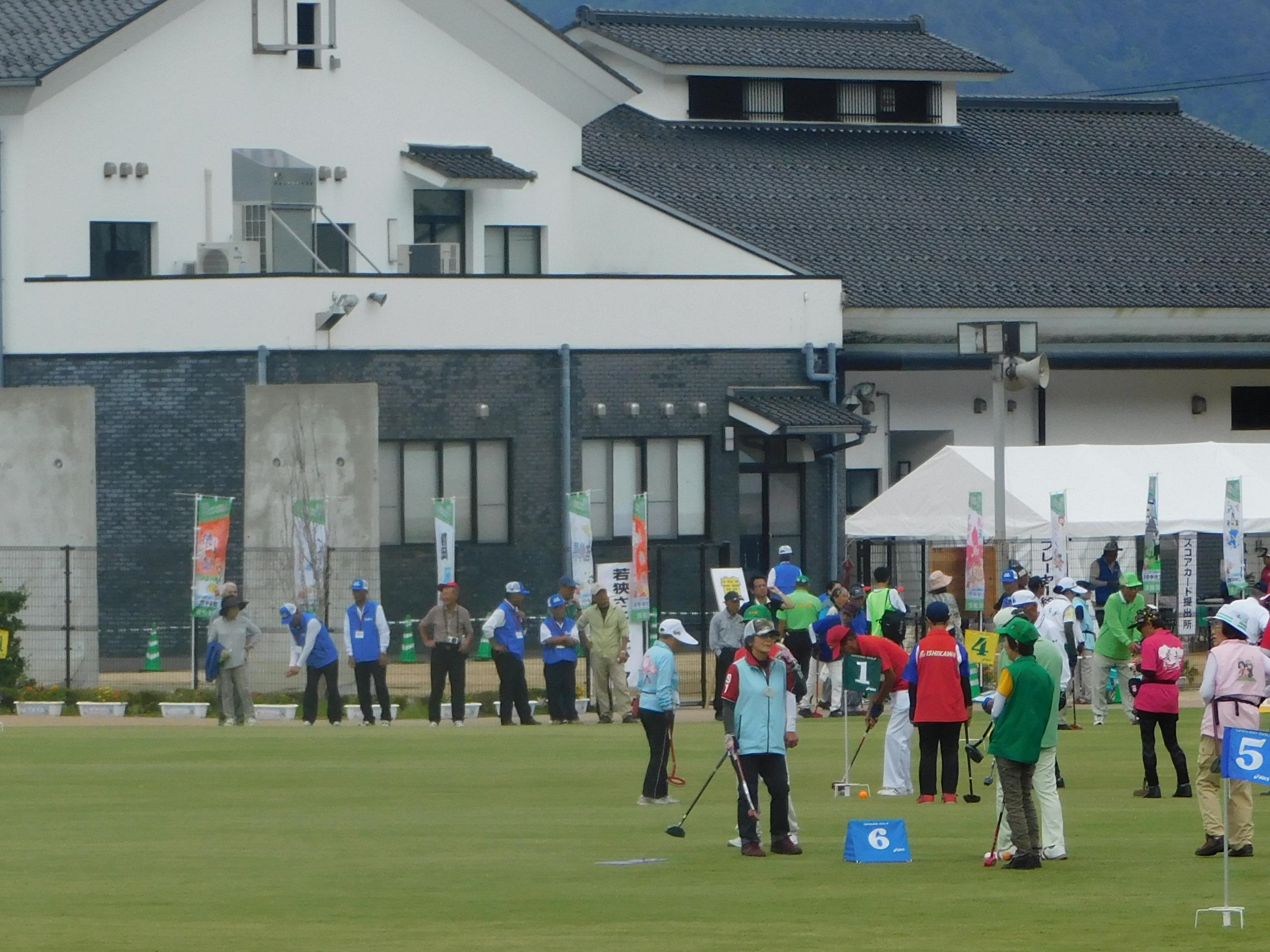 第73回国民体育大会の公開競技のグラウンド・ゴルフ、福井県若狭町多目的交流広場「若狭さとうみパーク」にて。